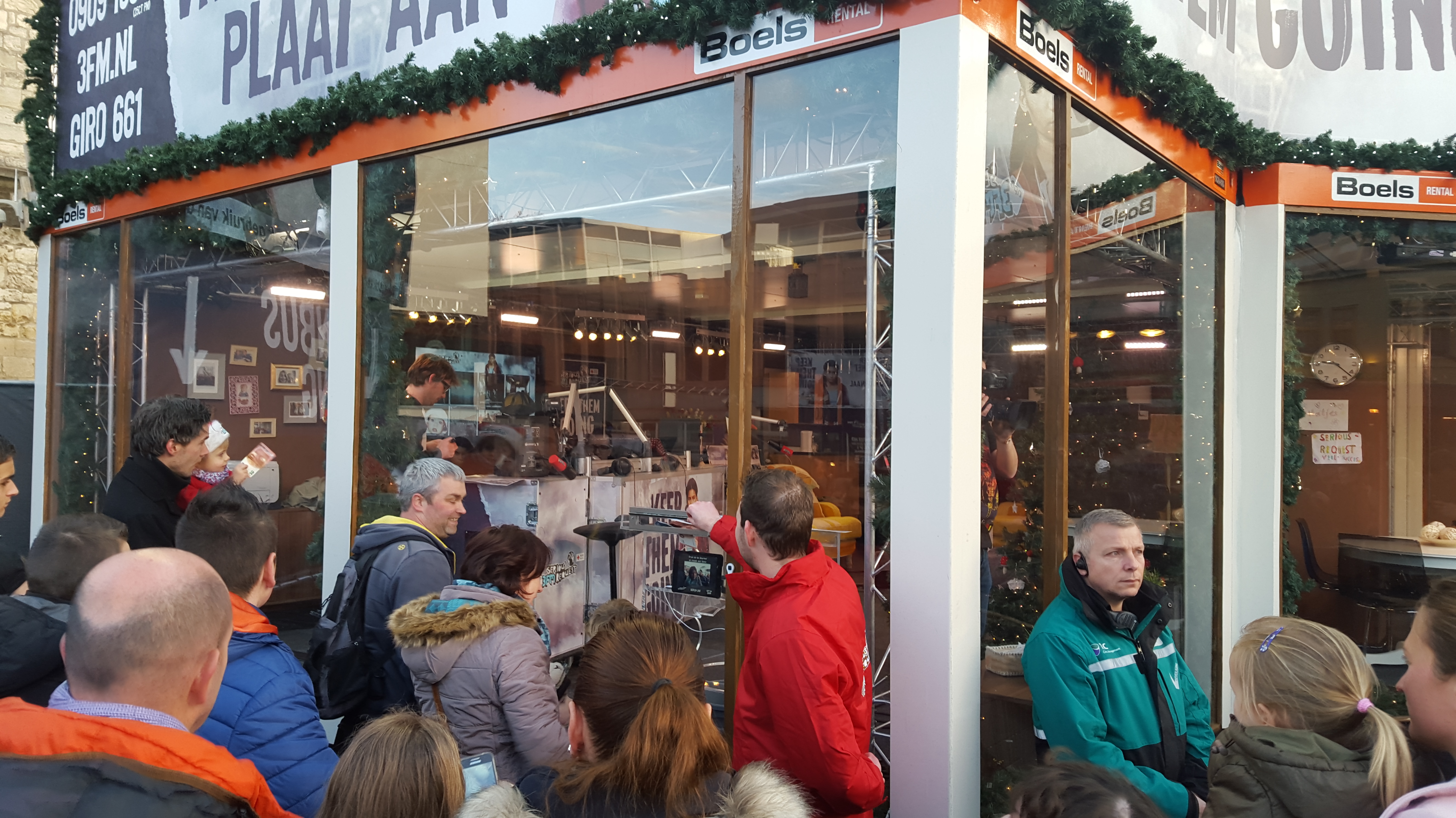 Het Glazen Huis in Heerlen, Serious Request 2015